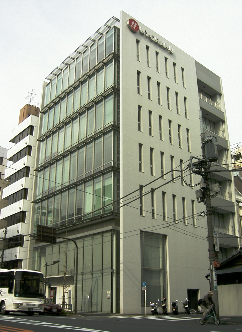 KYORAKU_Tokyo' Japan